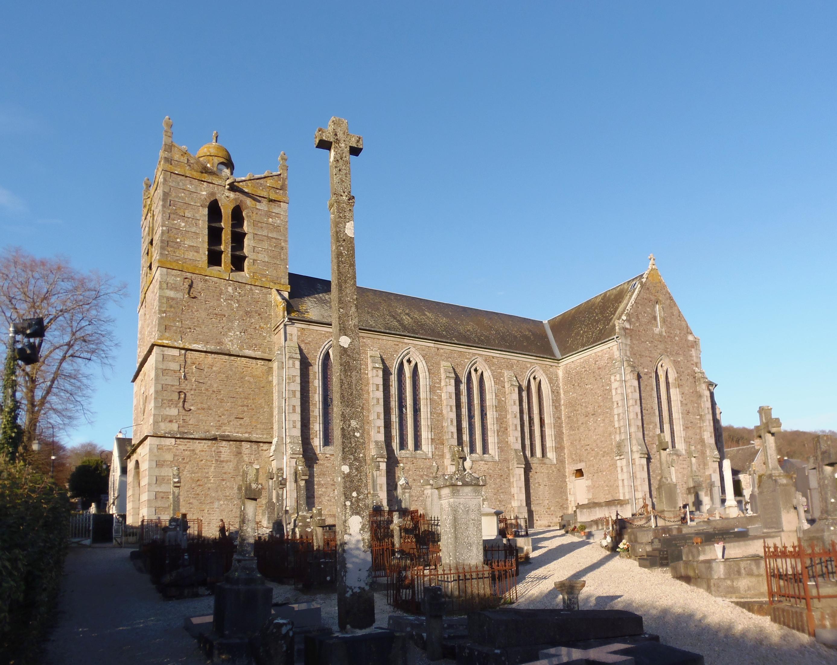 Le Bény-Bocage (Normandie, France). L'église Sainte-Honorine.